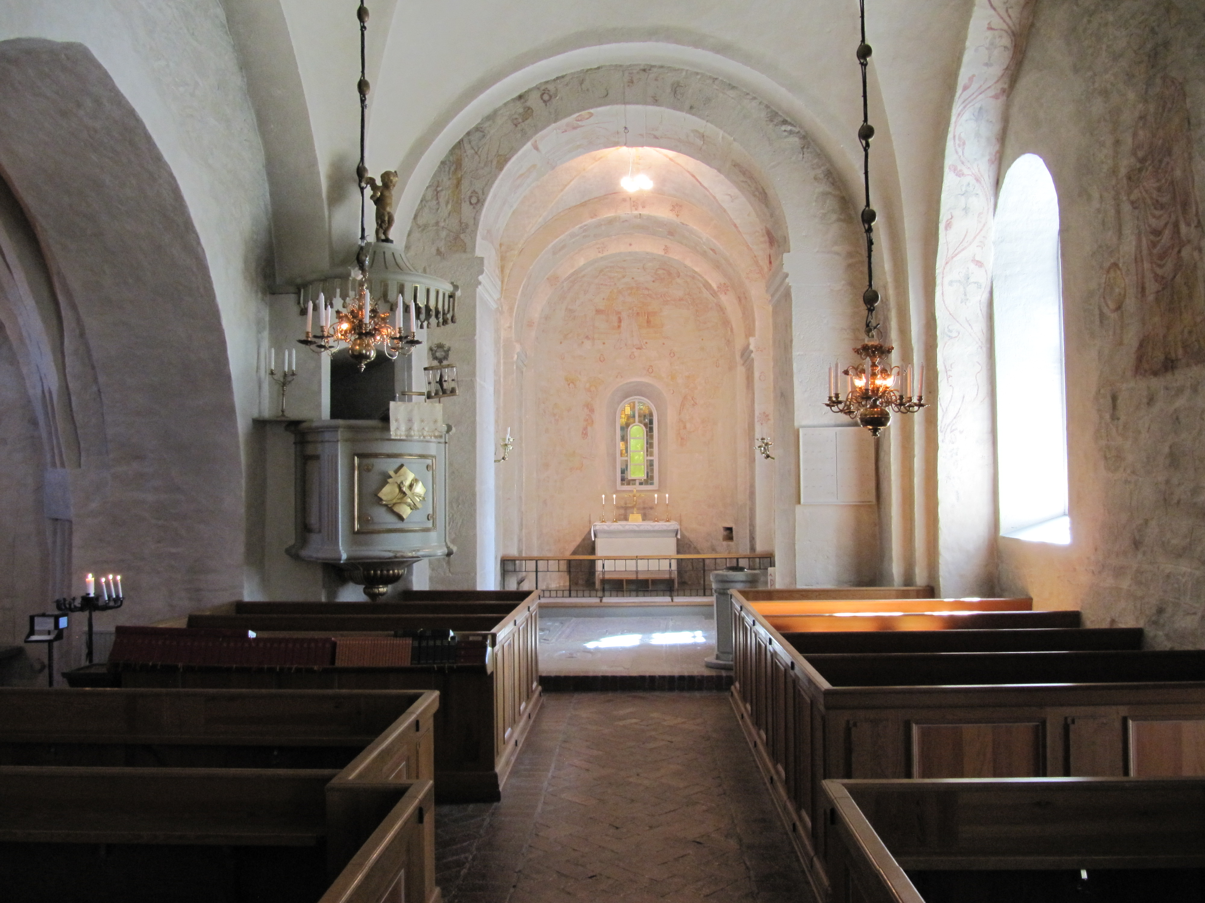 Kyrkorum i Skånela kyrka